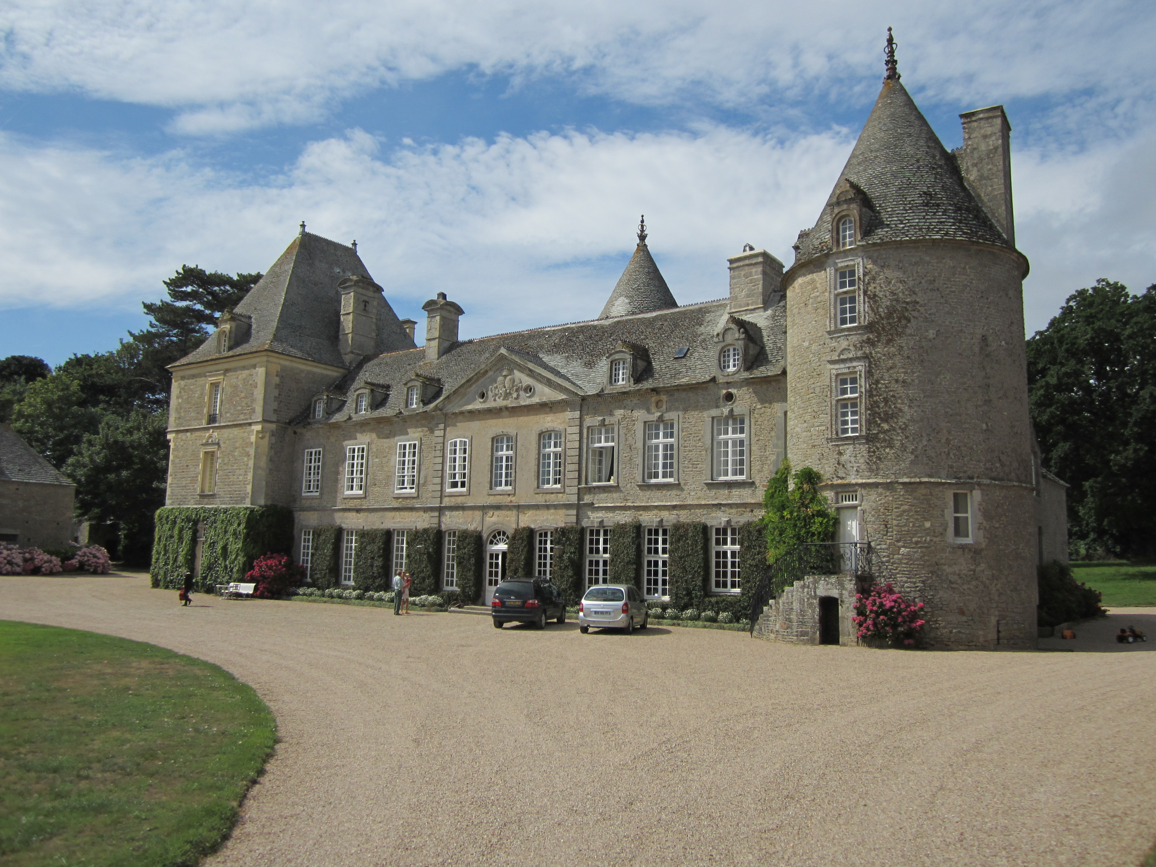 Château de Tocqueville, Manche les restes du pigeonnier16e siècle .